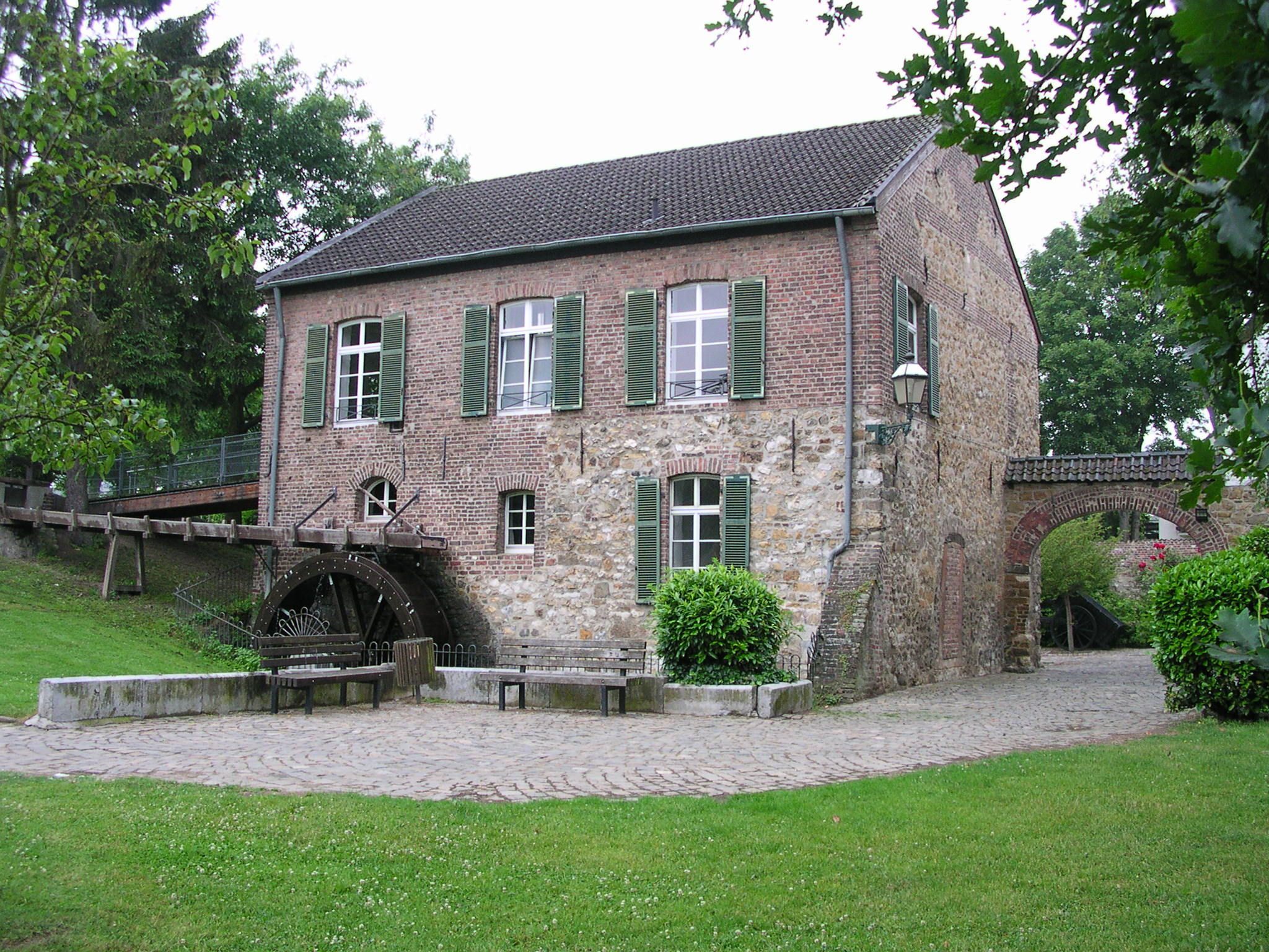 Aachen, Welsche Mühle in Haaren, heute u.a. Stadtteilbibliothek